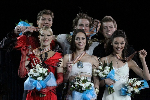 Подиум в танцах на льду на чемпионате Европы по фигурному катанию 2012. Слева на право: Екатерина Боброва/Дмитрий Соловьев (Росси, 2-е место), Натали Пешала/Фабьен Бурза (Франция, 1-е место), Елена Ильиных/Никита Кацалапов (Россия, 3-е место)